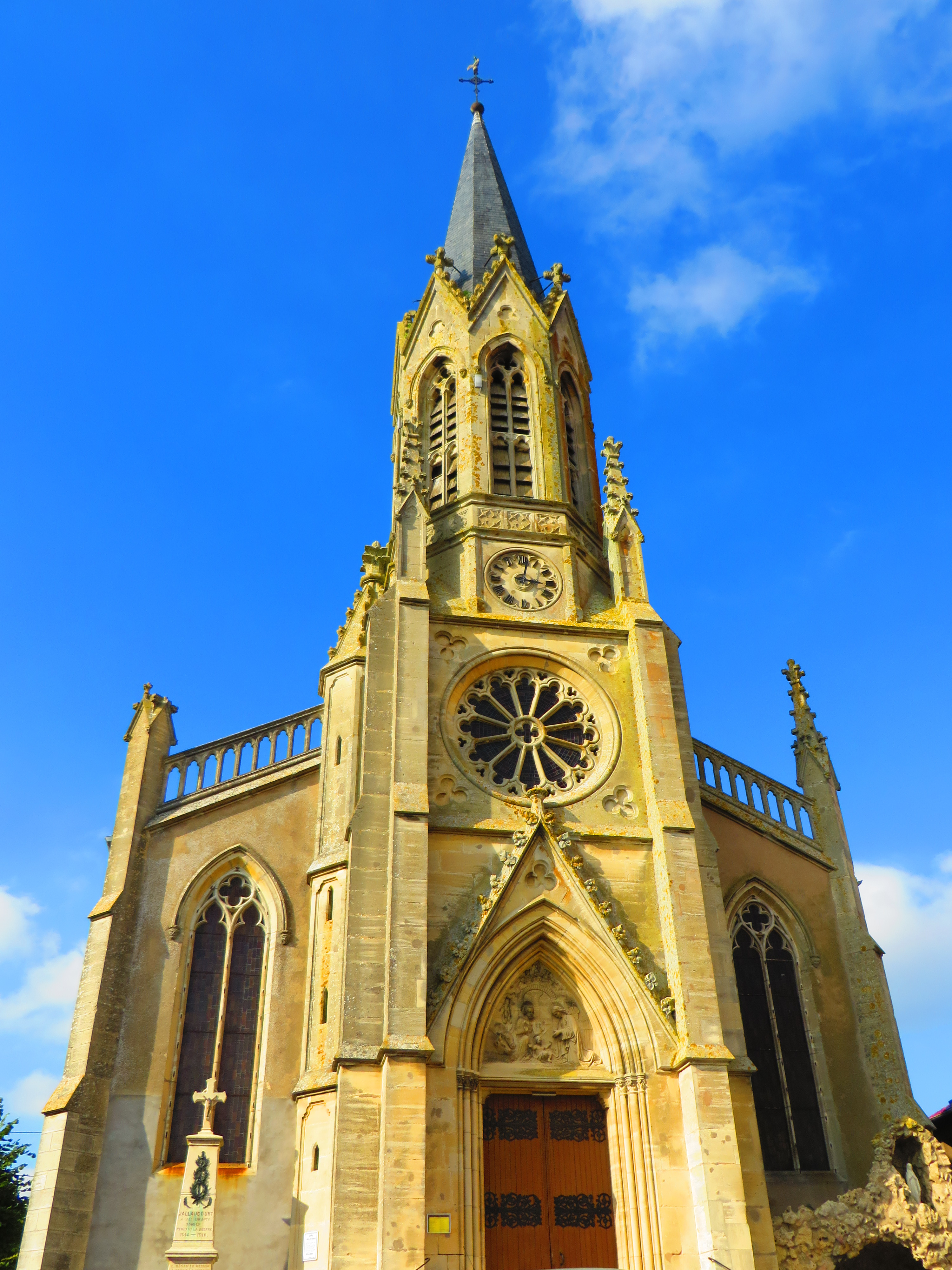 Jallaucourt l'église Saint-Denis